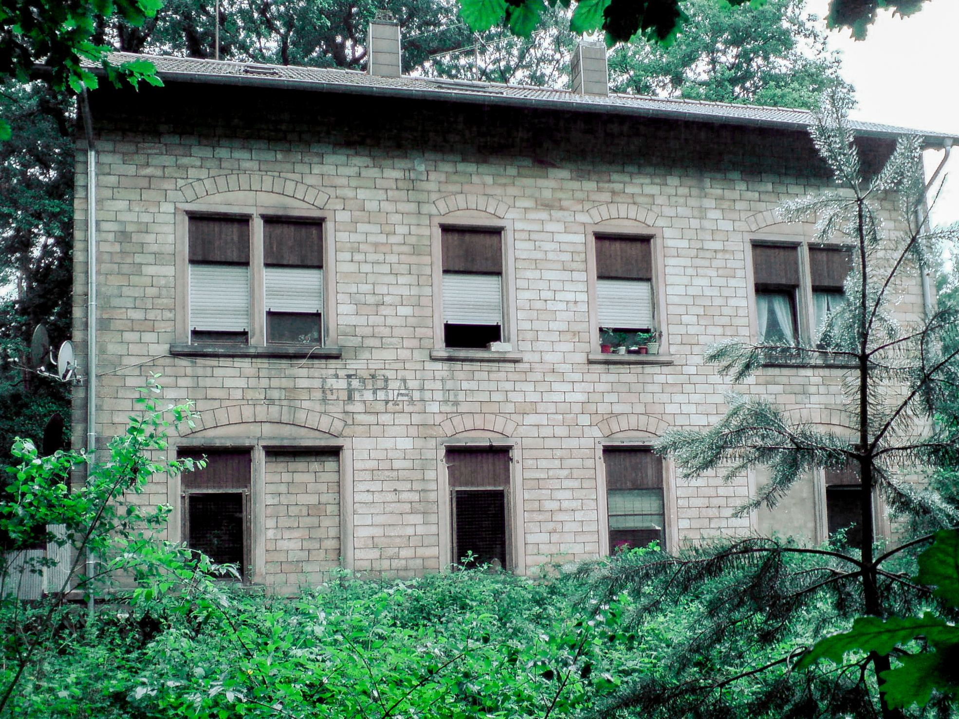 Der Erbacher Bahnhof an der Glantalbahn in Homburg Saar vom Bahnsteig aus gesehen Heute Sitz des Tierheim Homburg